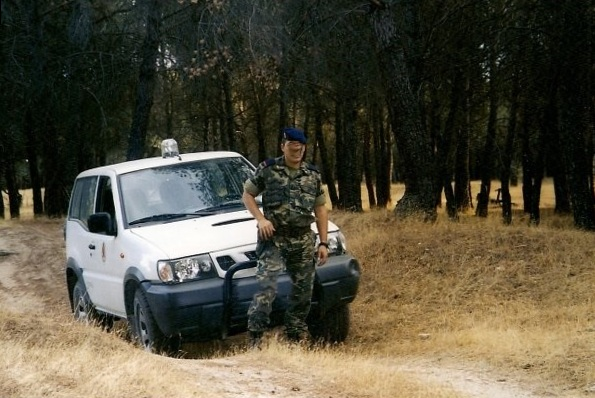 Personal del EER de servicio